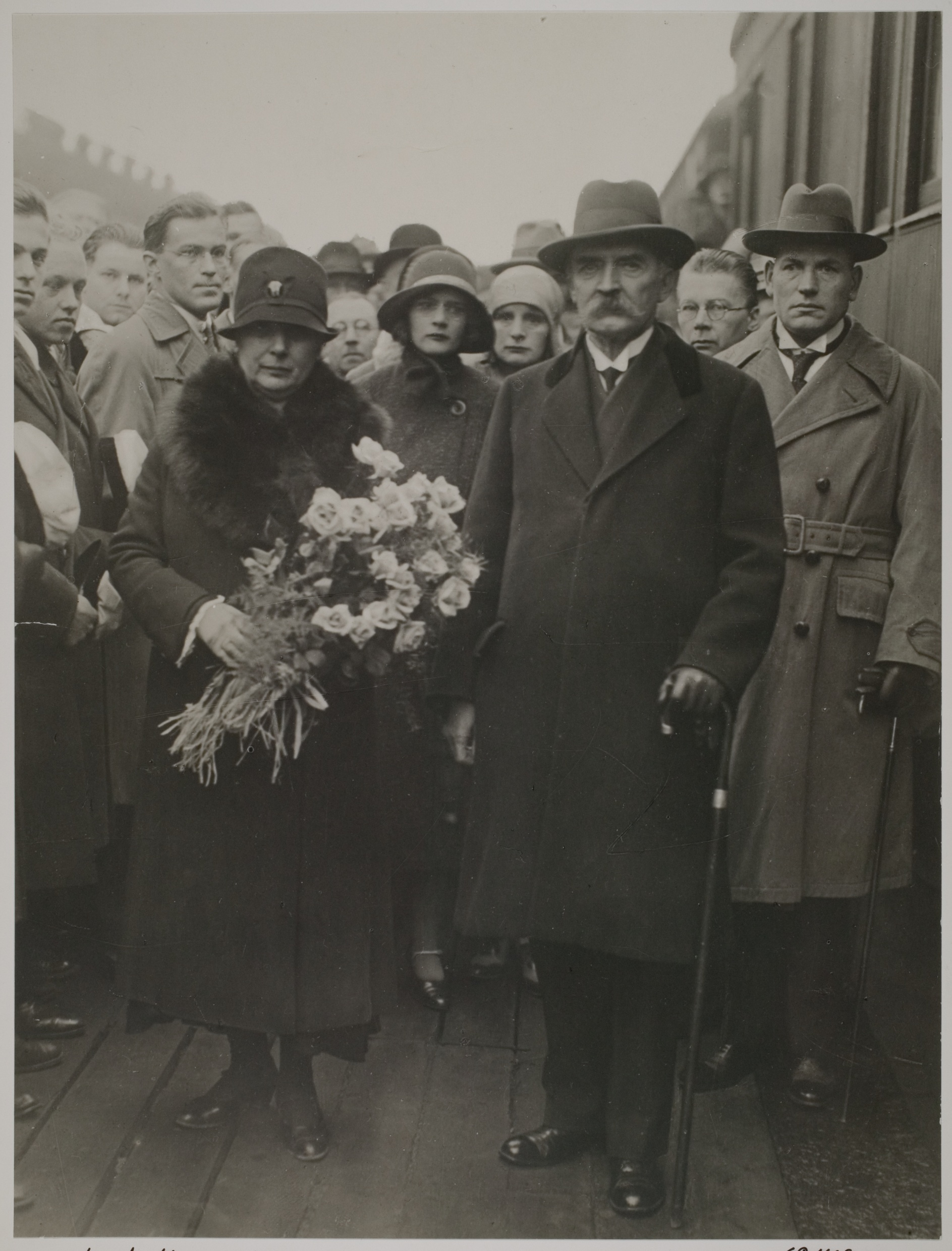 Presidentti ja rouva Ståhlbergin paluuvastaanotto Helsingin rautatieasemalla; Presidenttipari on palannut Joensuuhun päätyneeltä kyyditysmatkalta. Kuvassa keskellä Elli Ståhlberg.